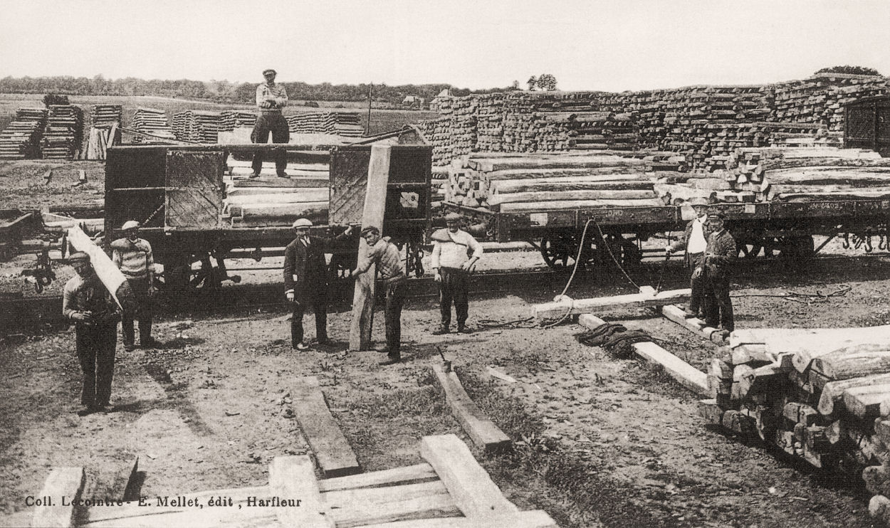 Wagons de La Cie du Nord à Montérolier-Buchy (ligne Amiens-Rouen)